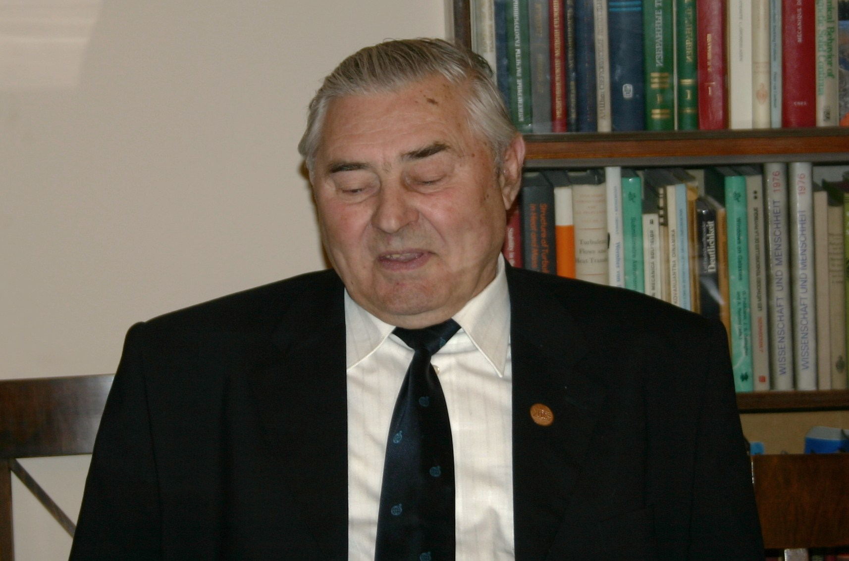 Марчук Г.И.